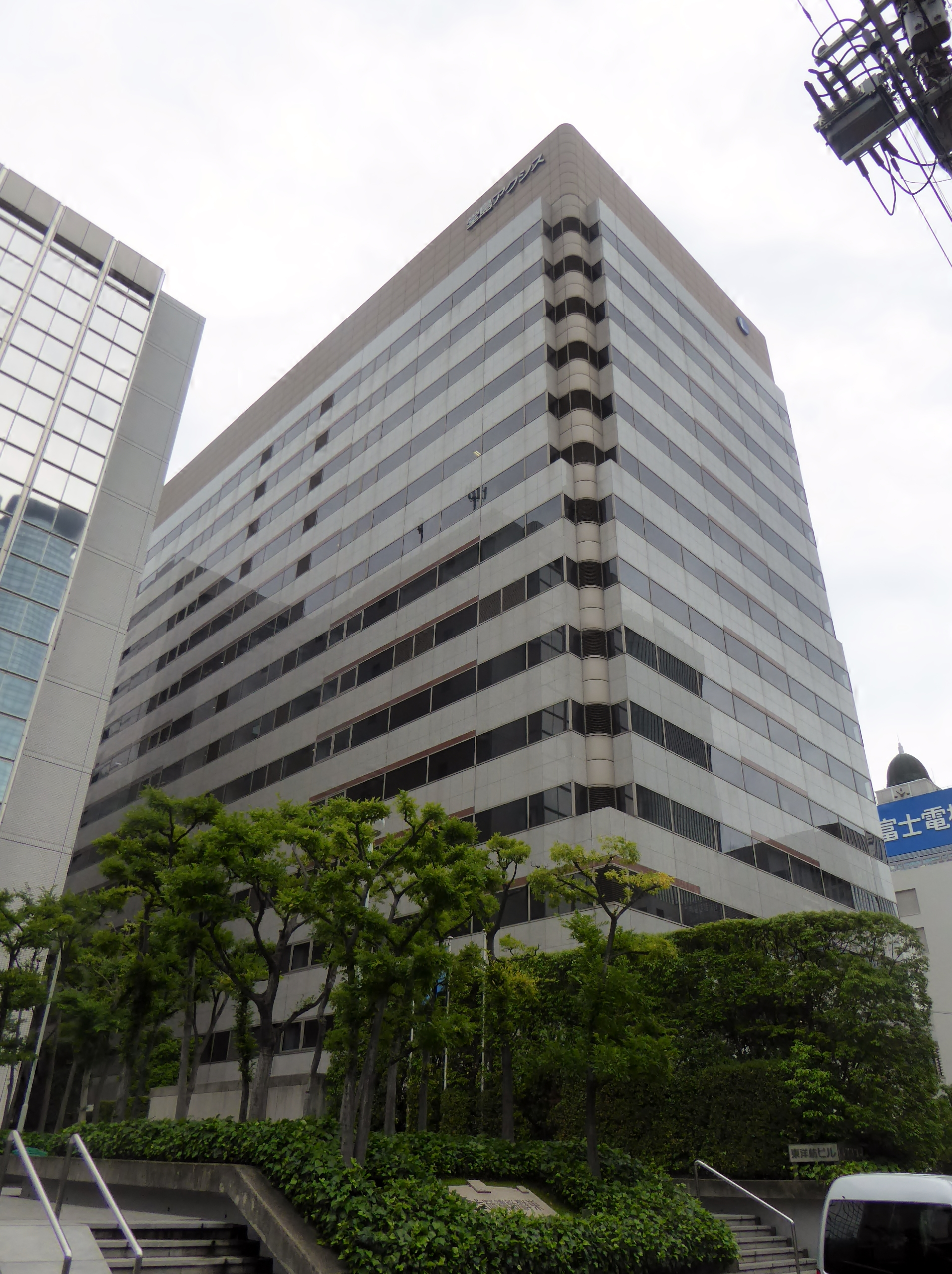 堂島アクシスビルを撮影。